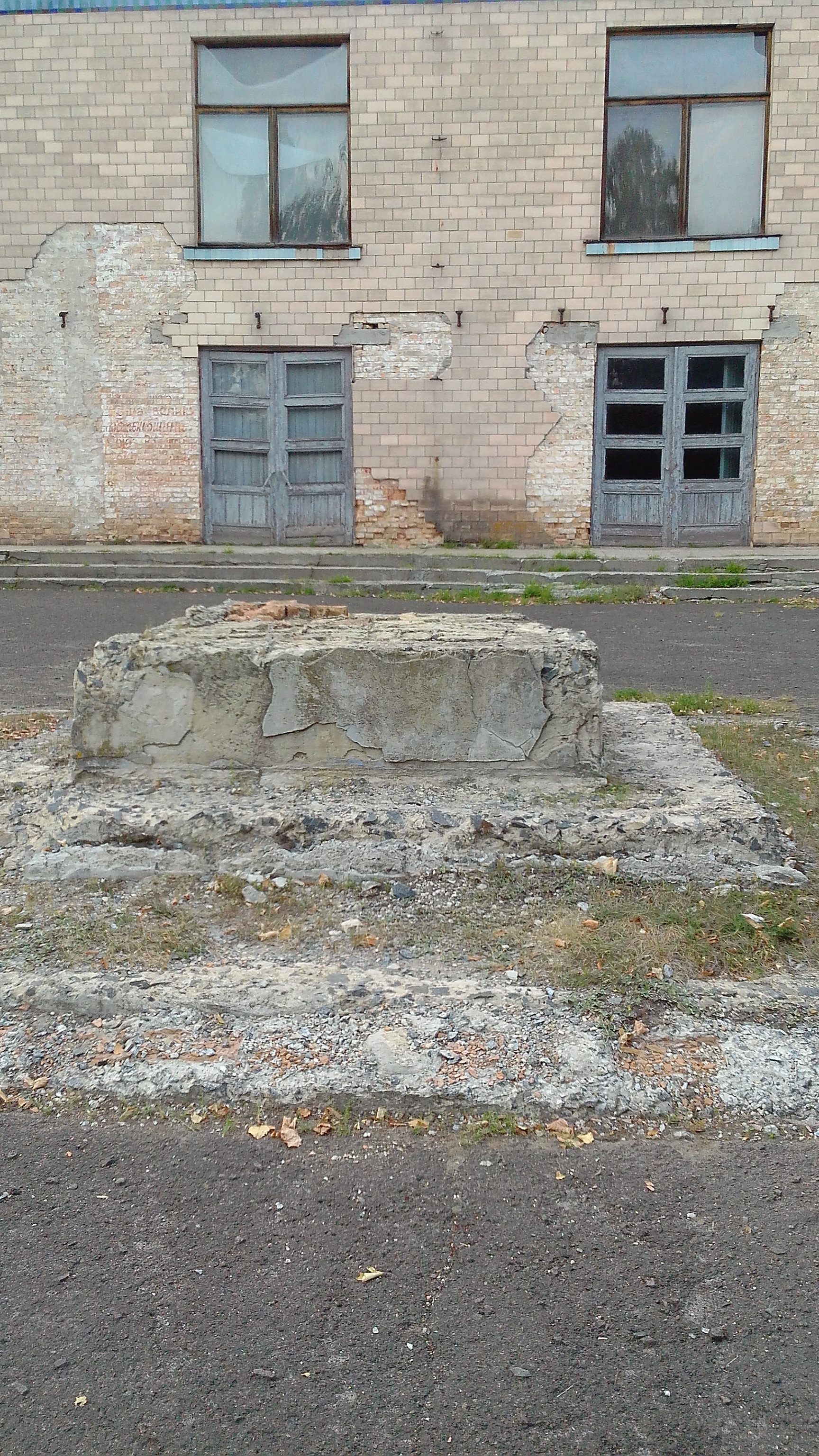 Місце, де знаходився пам'ятник Володимиру Леніну